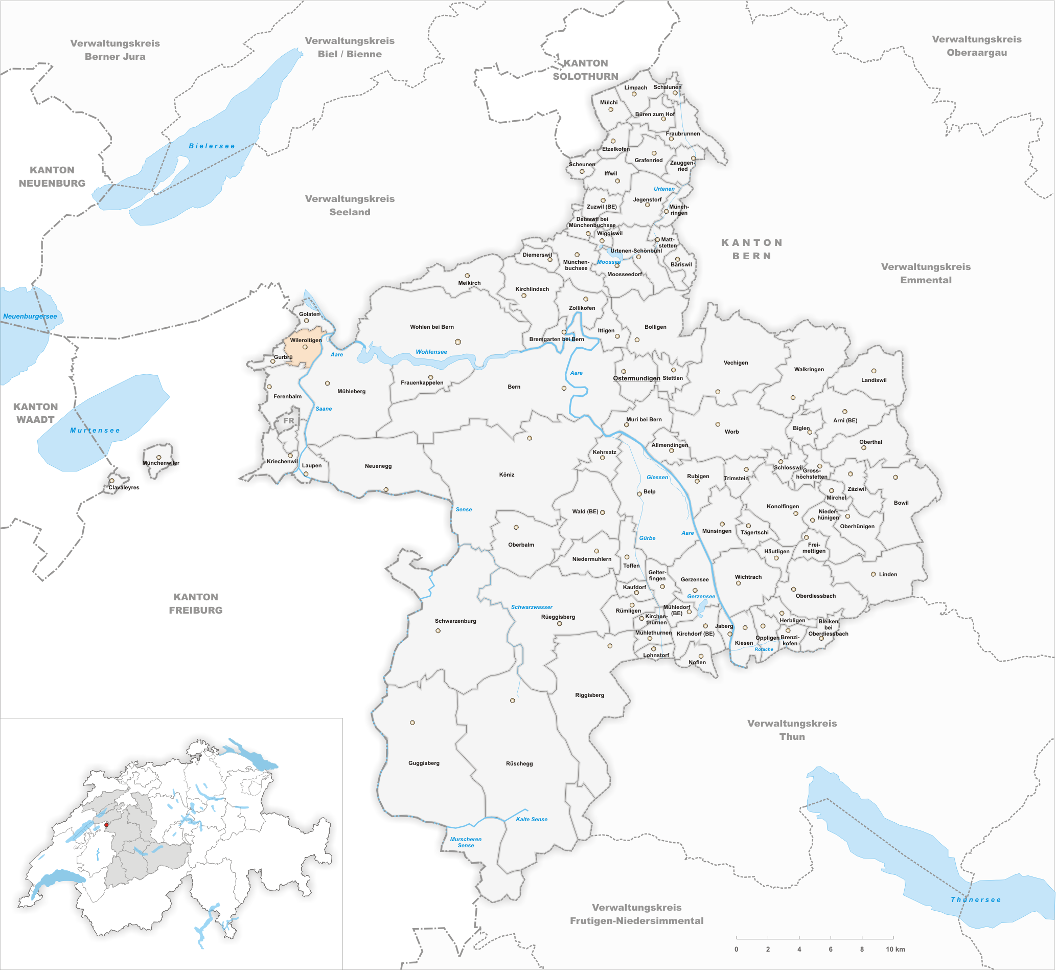 Municipality Wileroltigen